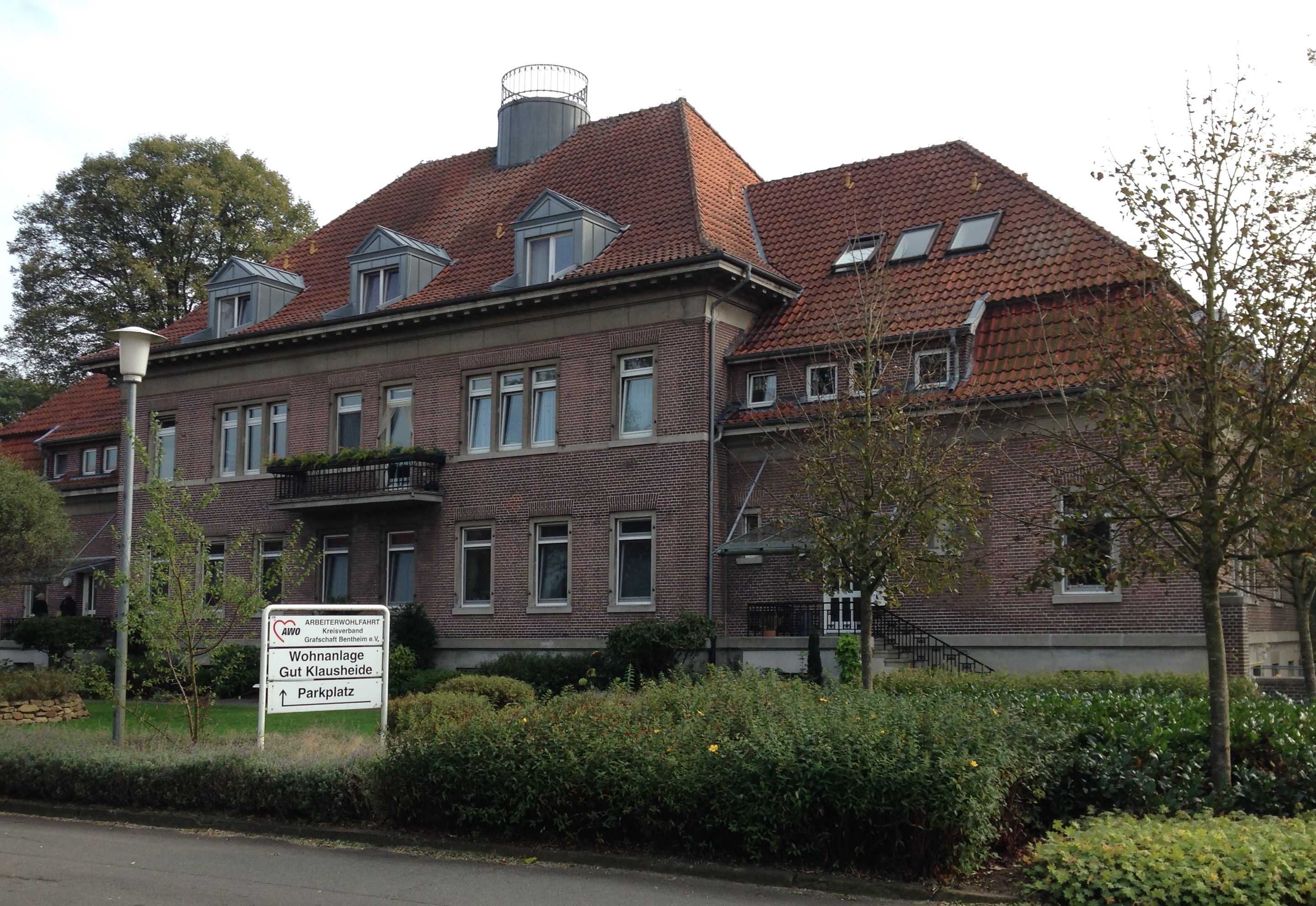 Sozialtherapeutisches Wohnheim der AWO, ehemaliges Herrenhaus Gut Klausheide, Ansicht Rückseite